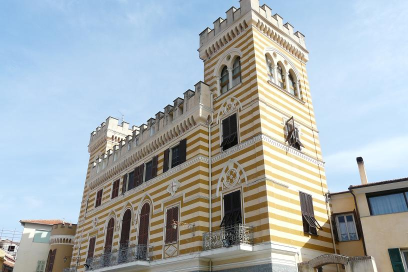 Foto varie del Castello di Castellaro, Liguria, Italia